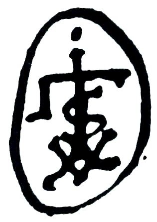 Steinmetzzeichen_Strickner_Johannes